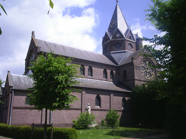 Kerk te Ohé en Laak, foto eigen werk